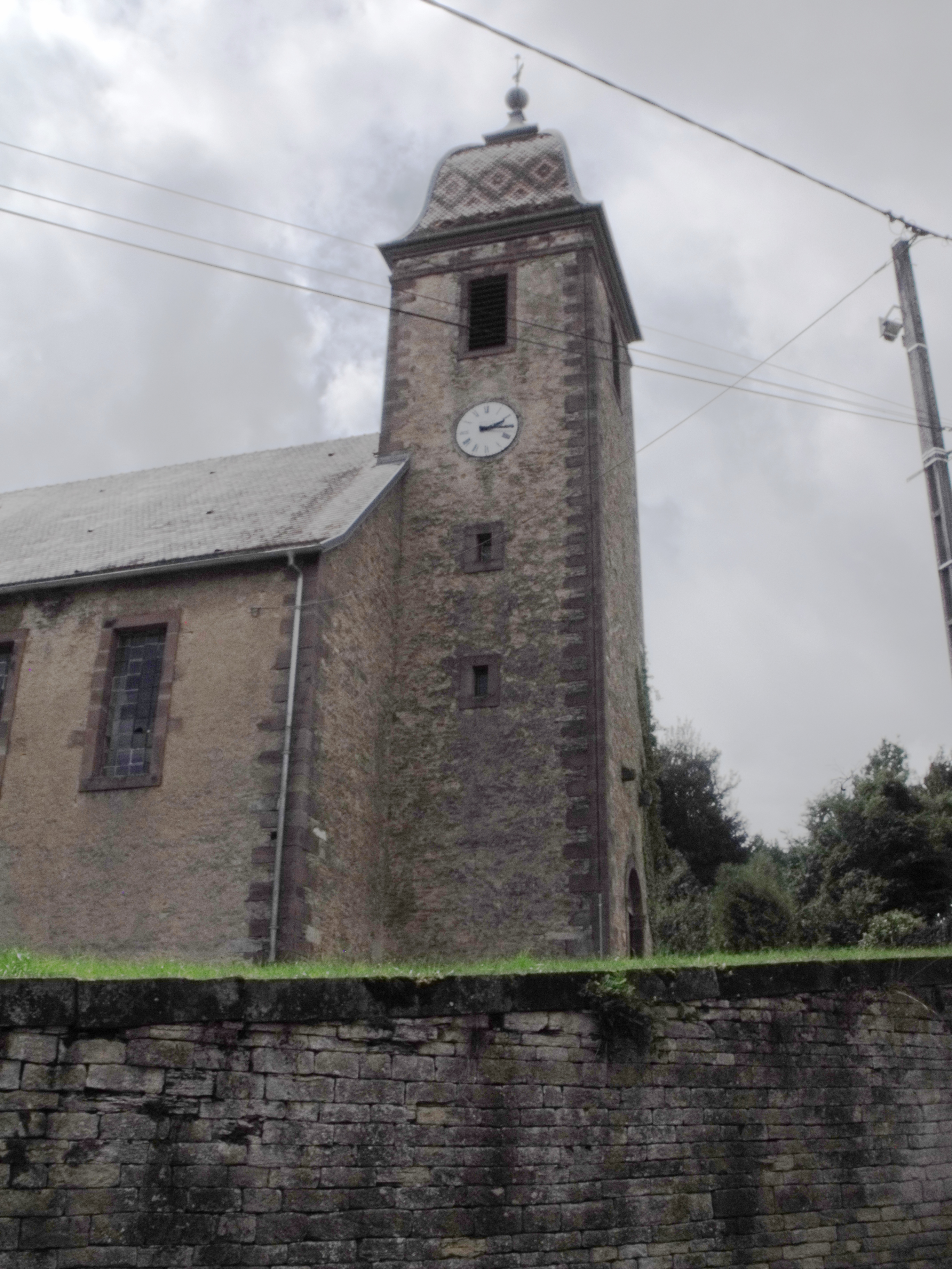 Temple à Aibre, Doubs, France